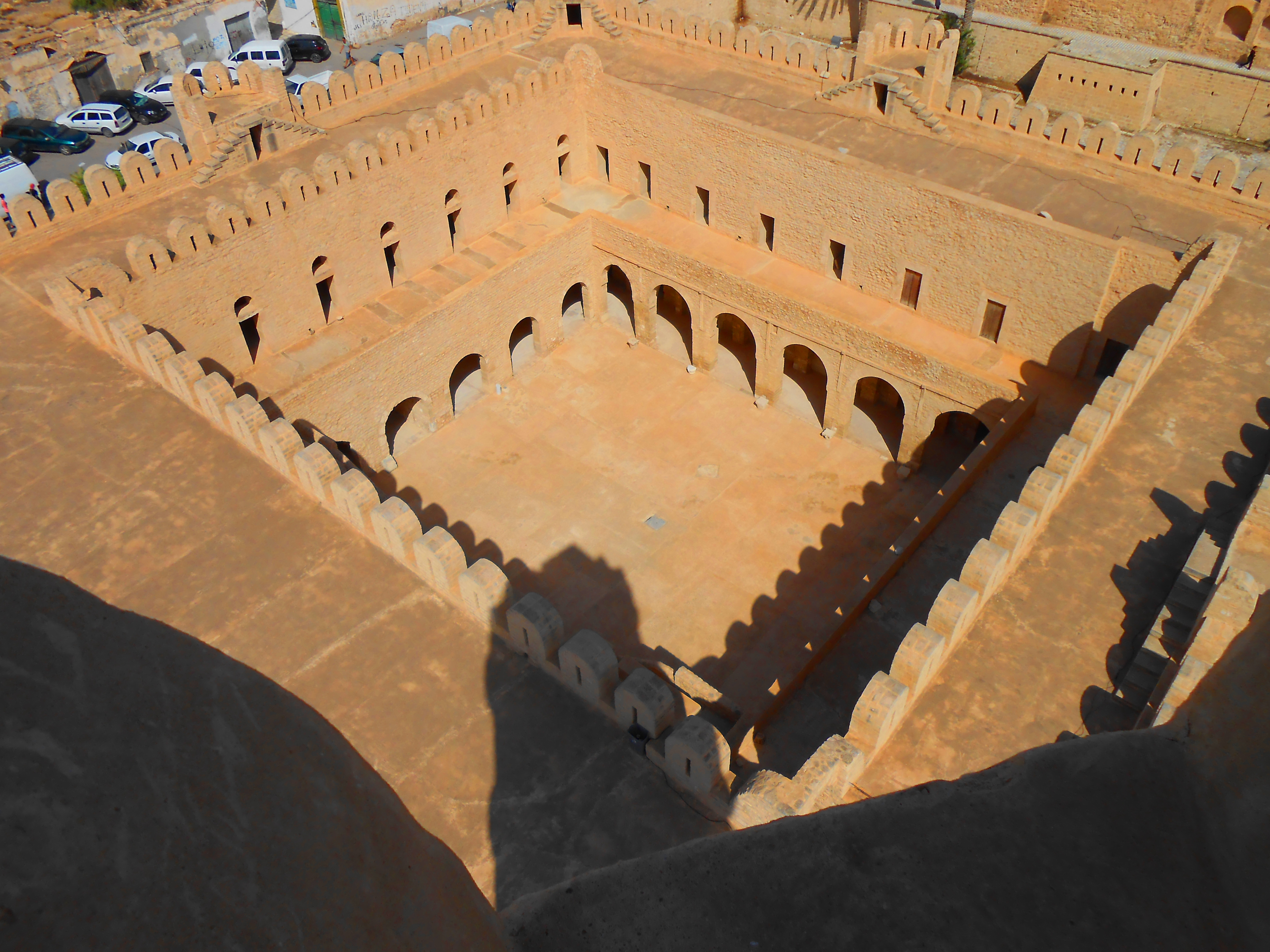 Cour du ribat de Sousse